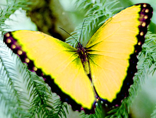 Фото Золотокрила кубка в Азії